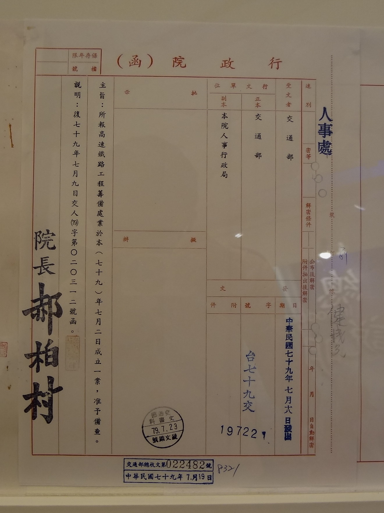 1990年（中華民國79年）7月18日，行政院函，交通部高速鐵路工程籌備處成立案准予備查。